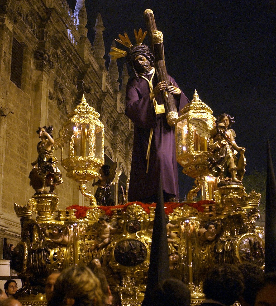 El Gran Poder de Sevilla por la Catedral